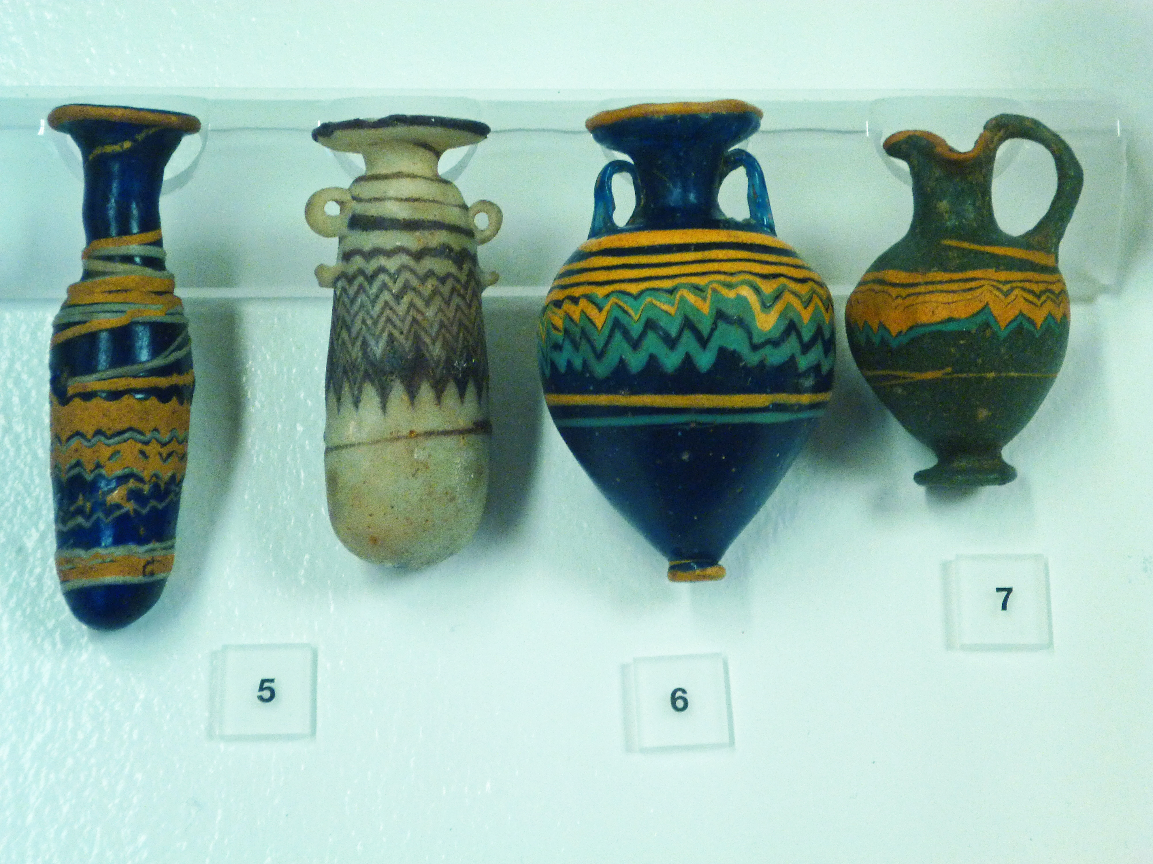 Girona : Museu d'Arqueologia de Catalunya : Vasos per a perfums, vidre, s. VI-IV aC. Empúries (l'Escala, Alt Empordà) 5. Alabastres 6. Amforisc 7. Oenochoe